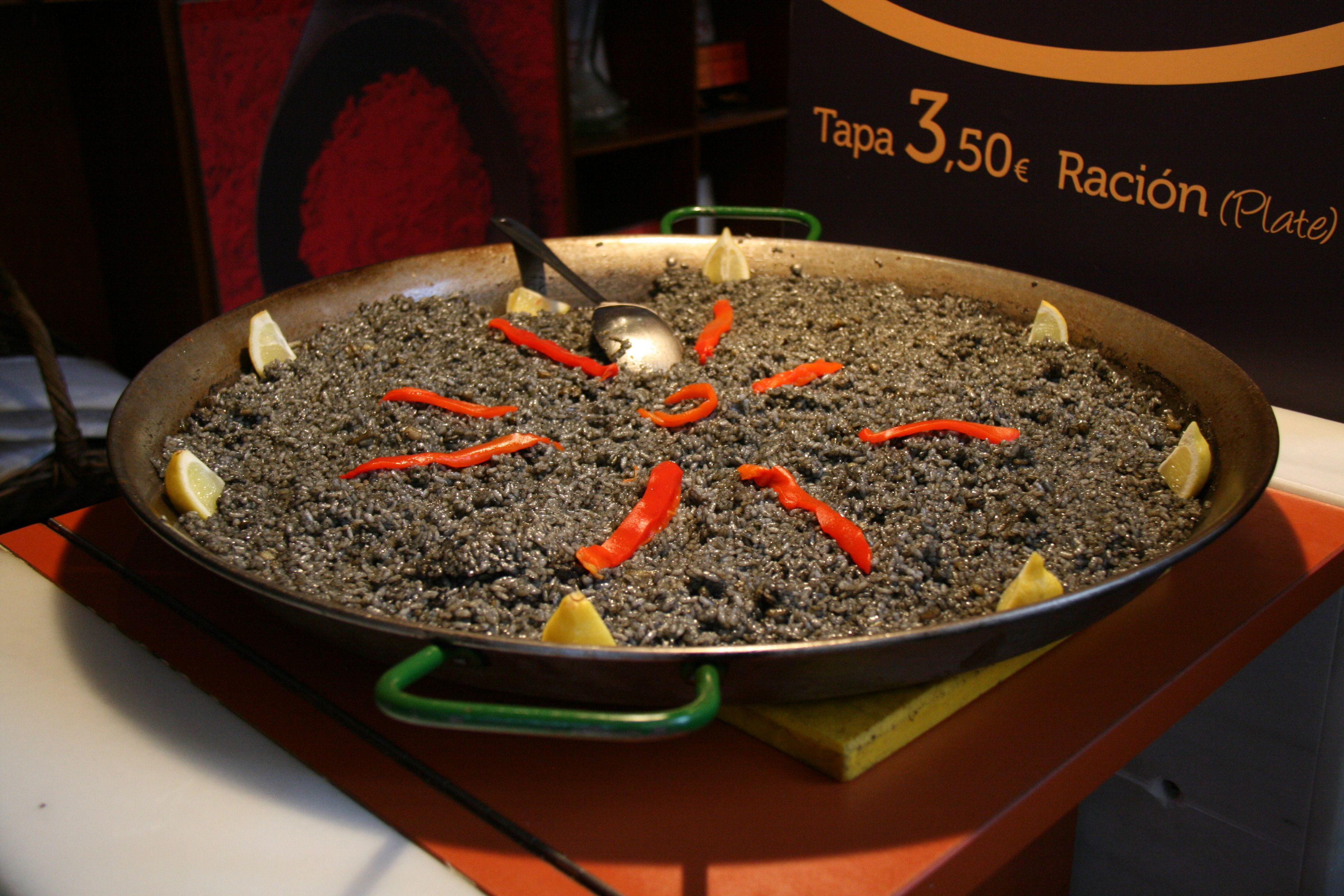 Arroz negro elaborado con la tinta del calamar